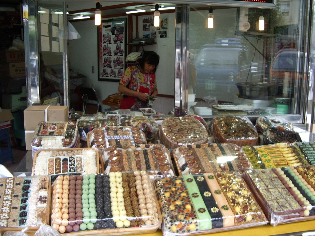 Boutique de sucreries, Séoul, Corée du Sud